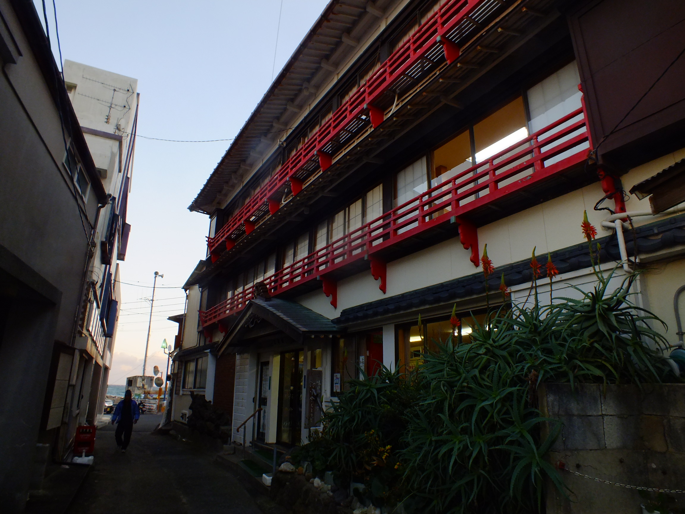 Futomihama,Kamogawa,Chiba 千葉県鴨川市太海浜 江澤館